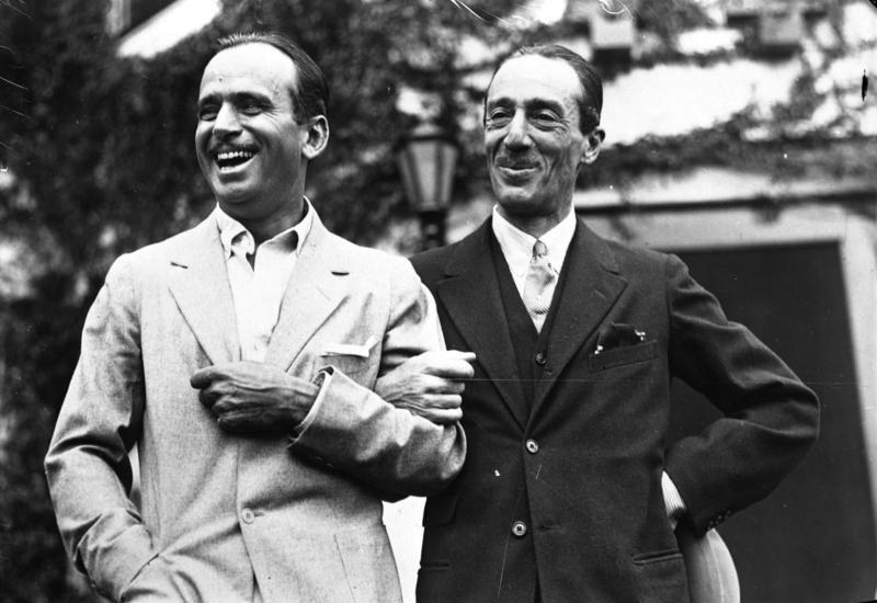 Der spanische Herzog von Alba ist zum Unterrichtsminister ernannt worden !